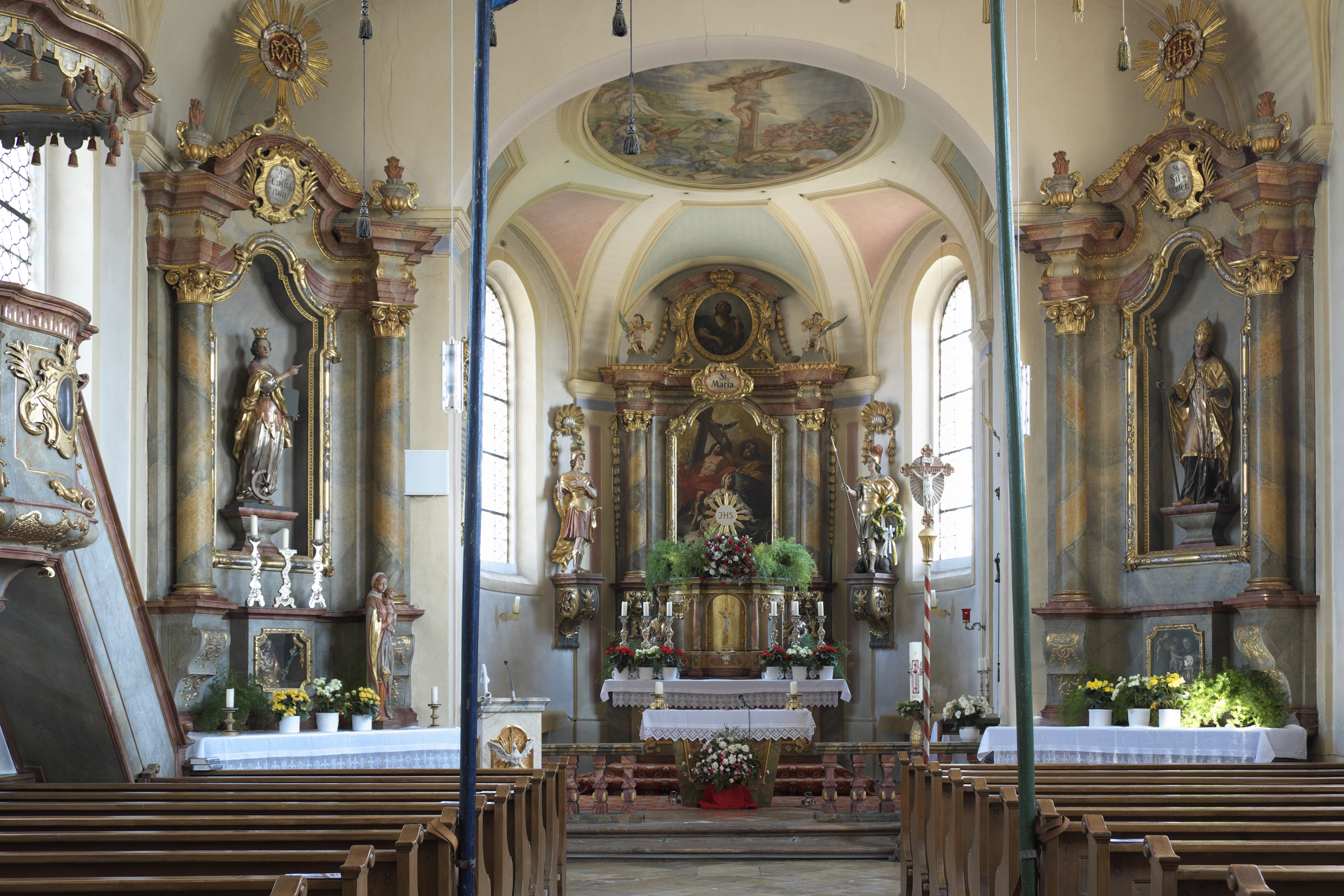 Katholische Pfarrkirche St. Georg in Hohenschäftlarn, einem Ortsteil von Schäftlarn im Landkreis München (Bayern/Deutschland), Innenraum